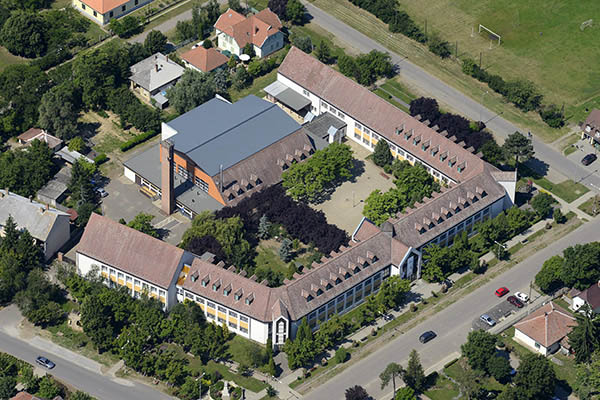 Légi fotó az abádszalóki általános iskoláról